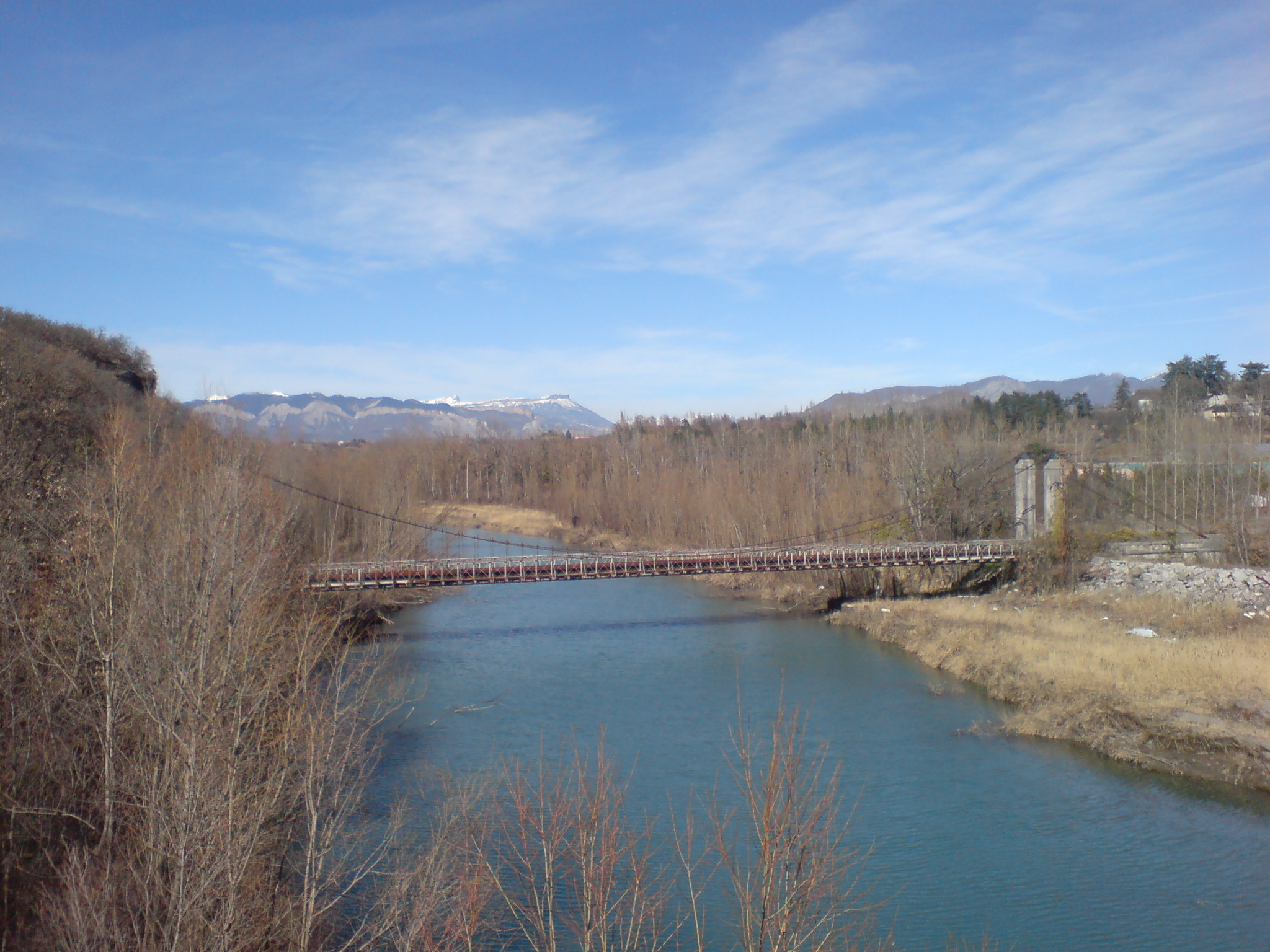 Autre vue partielle du pont suspendu de Fombeton sur la Durance, commune de Valernes